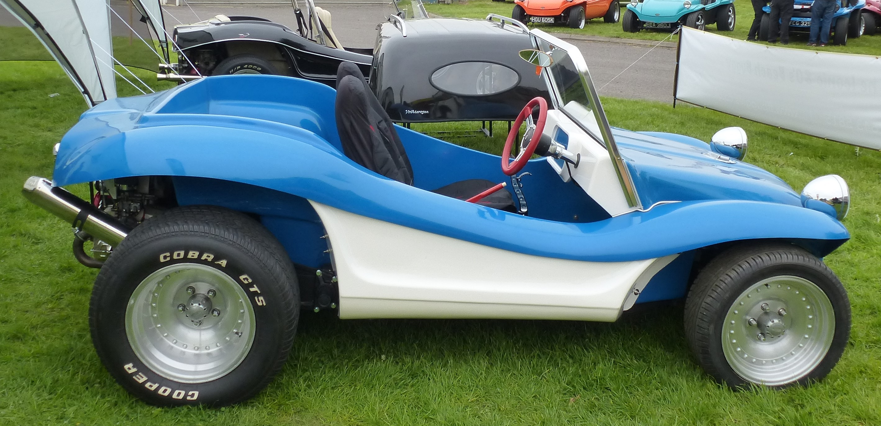 FF Buggy